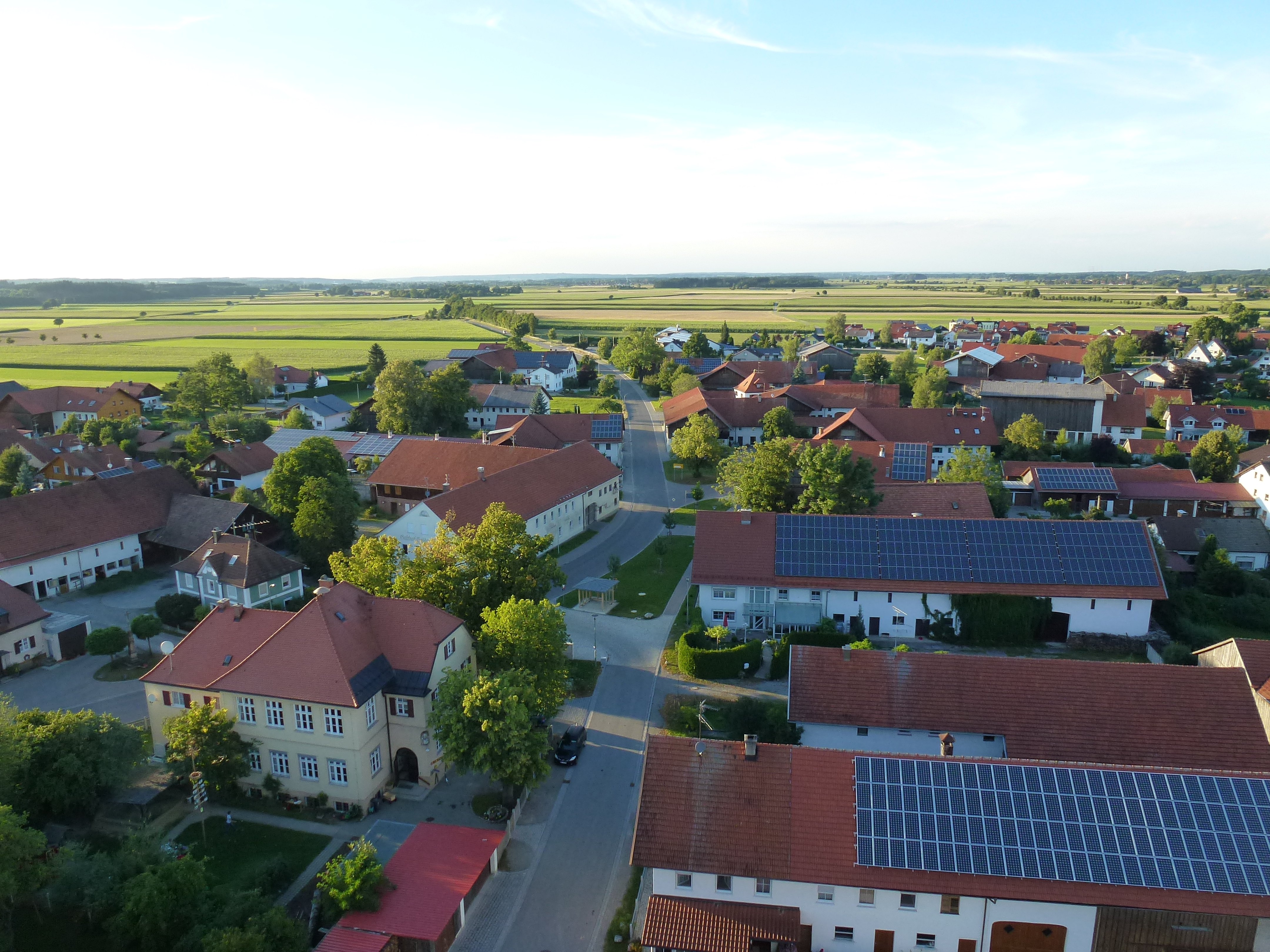 Blick vom Kirchturm in den Norden